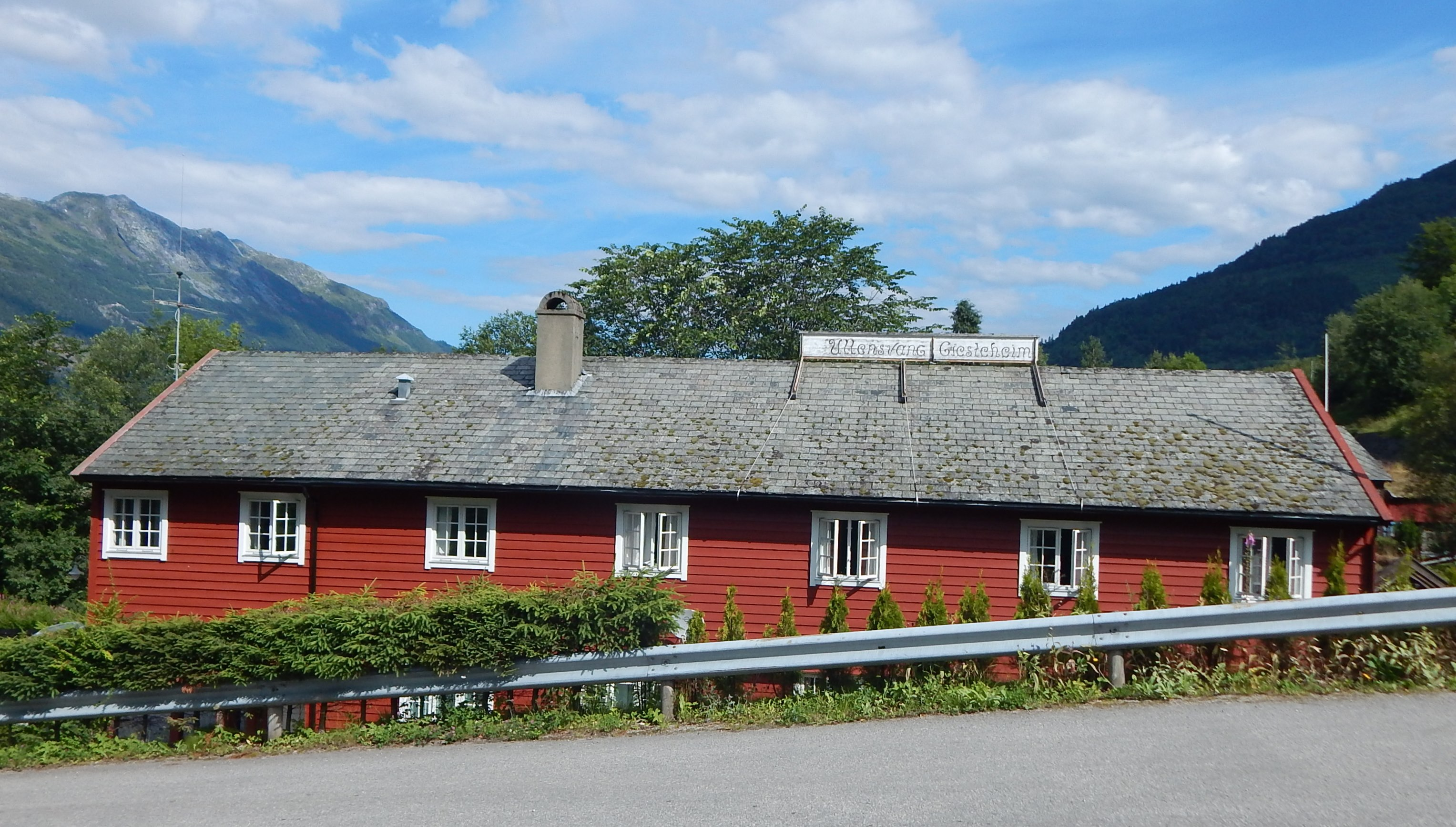 Ullensvang gjesteheim, Lofthus